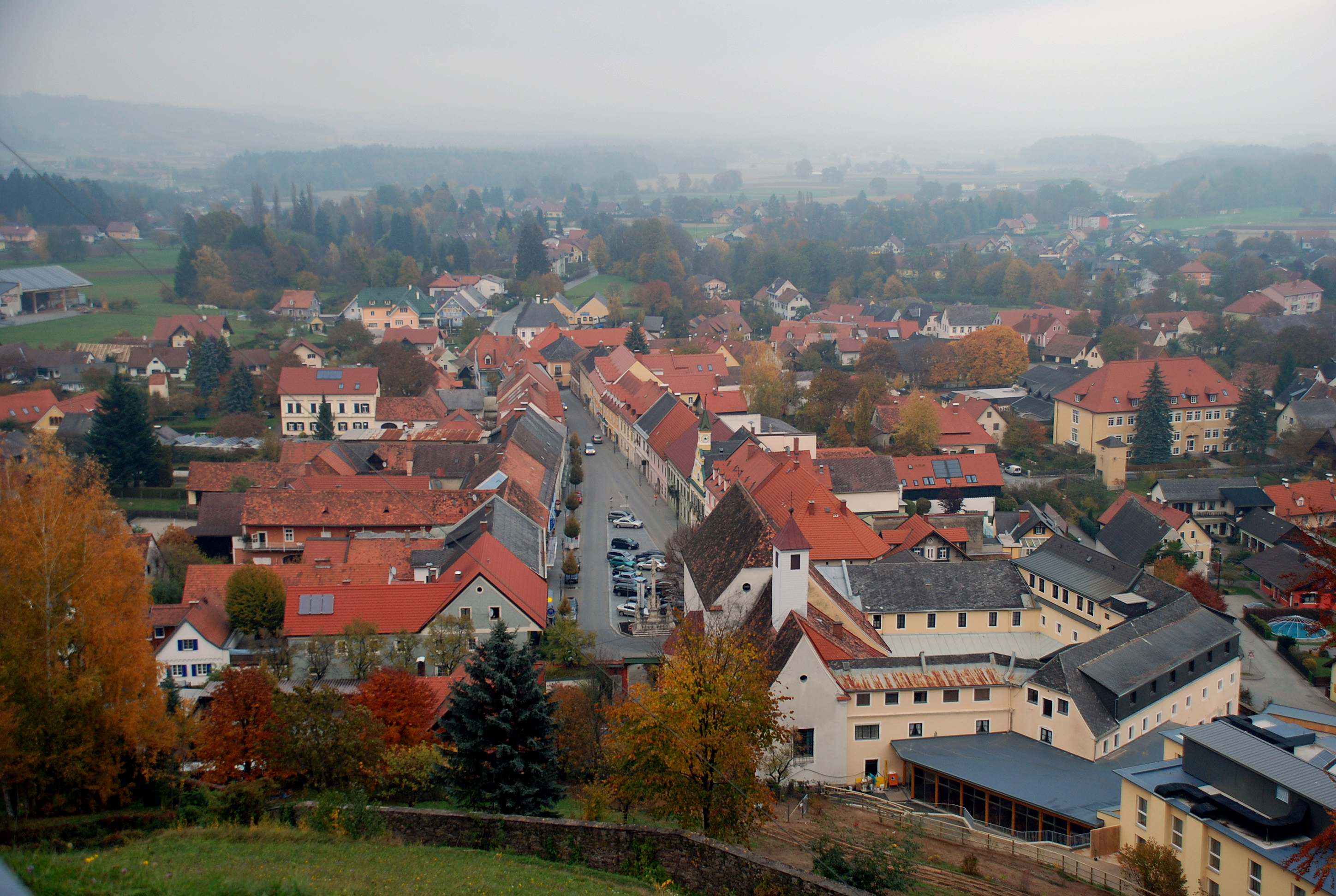 Schwanberg, Steiermark, Österreich, Blick auf die Stadt, im Vordergrund links die Gebäude des ehem Kapuzinerklosters, mittig der dreiecksförmige Hauptplatz